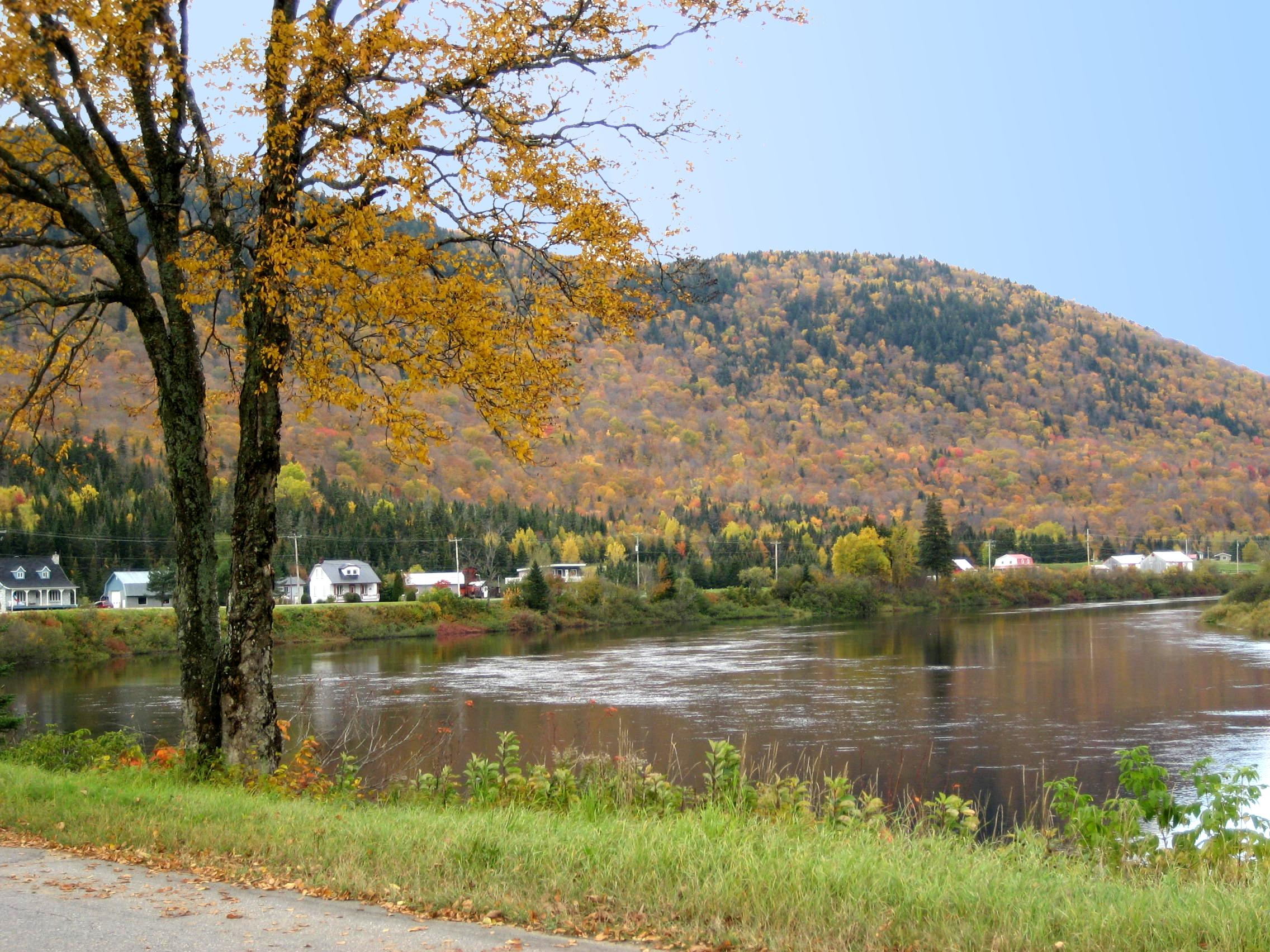 Paysage d'automne dans la Vallée de la Jacques-Cartier